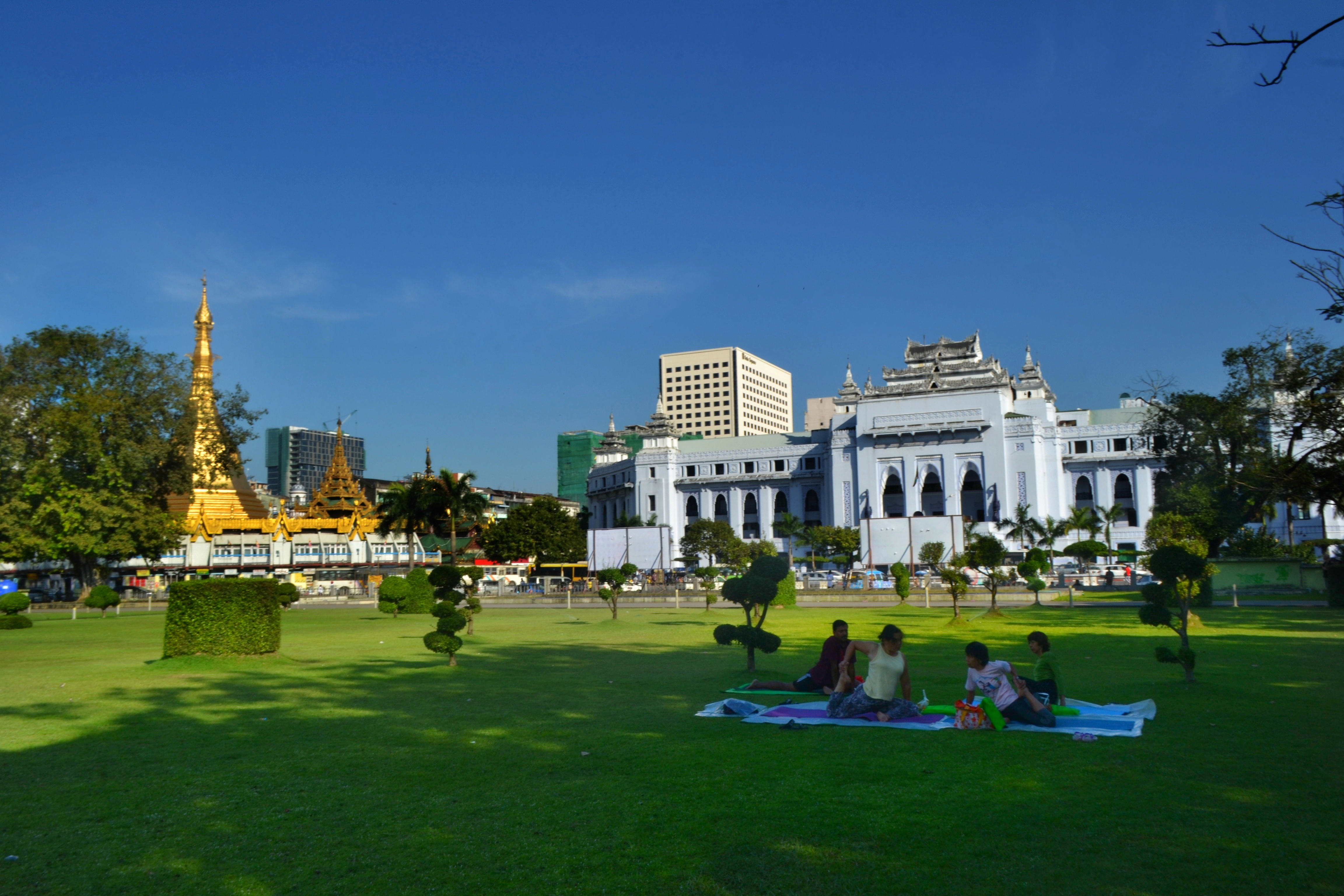 မြန်မာဘာသာ: ဆူးလေစေတီတော်နှင့် မြို့တော်ခန်းမအား တွဲလျက်မြင်ရသောမြင်ကွင်းဖြစ်သည်။